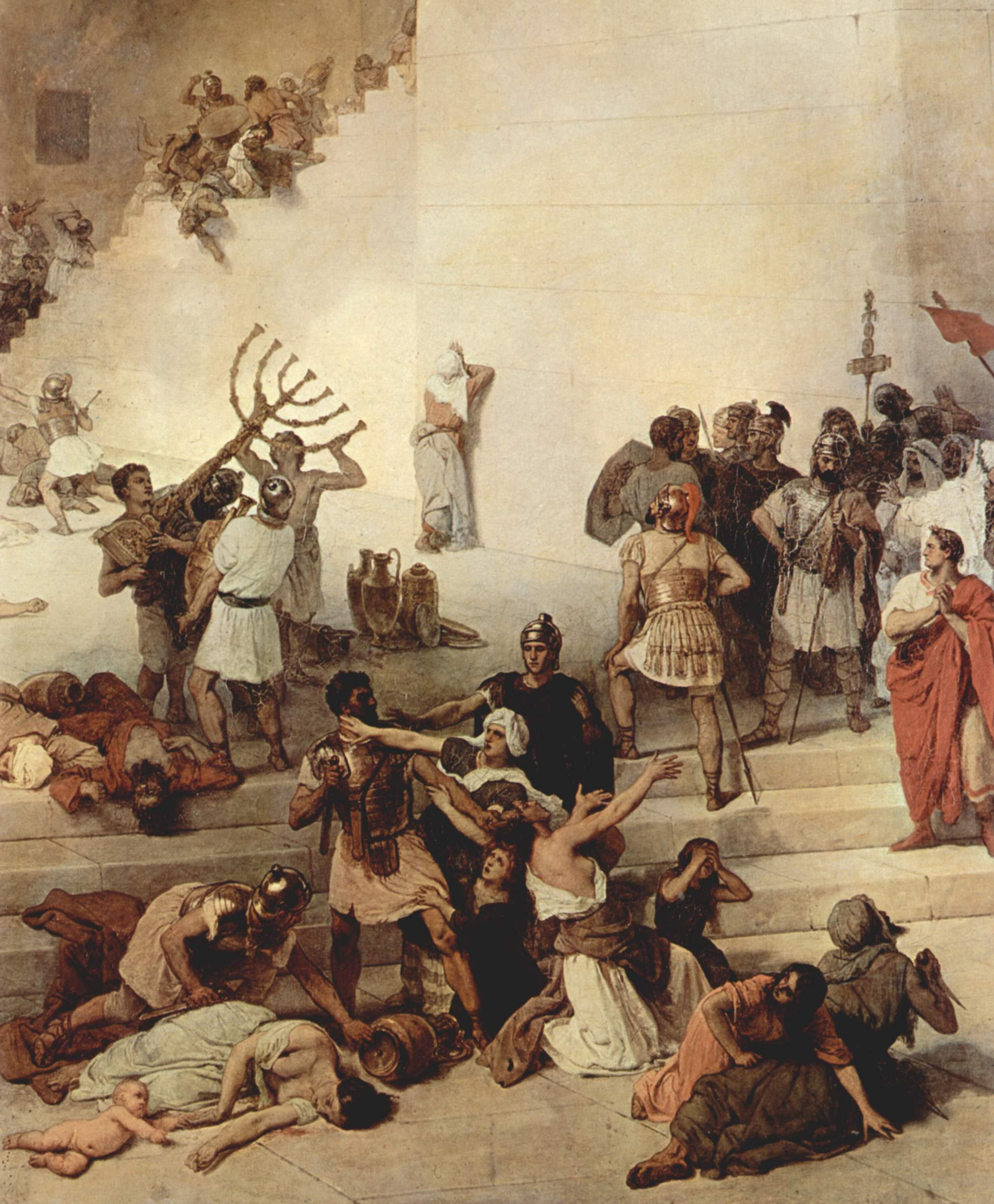 detail